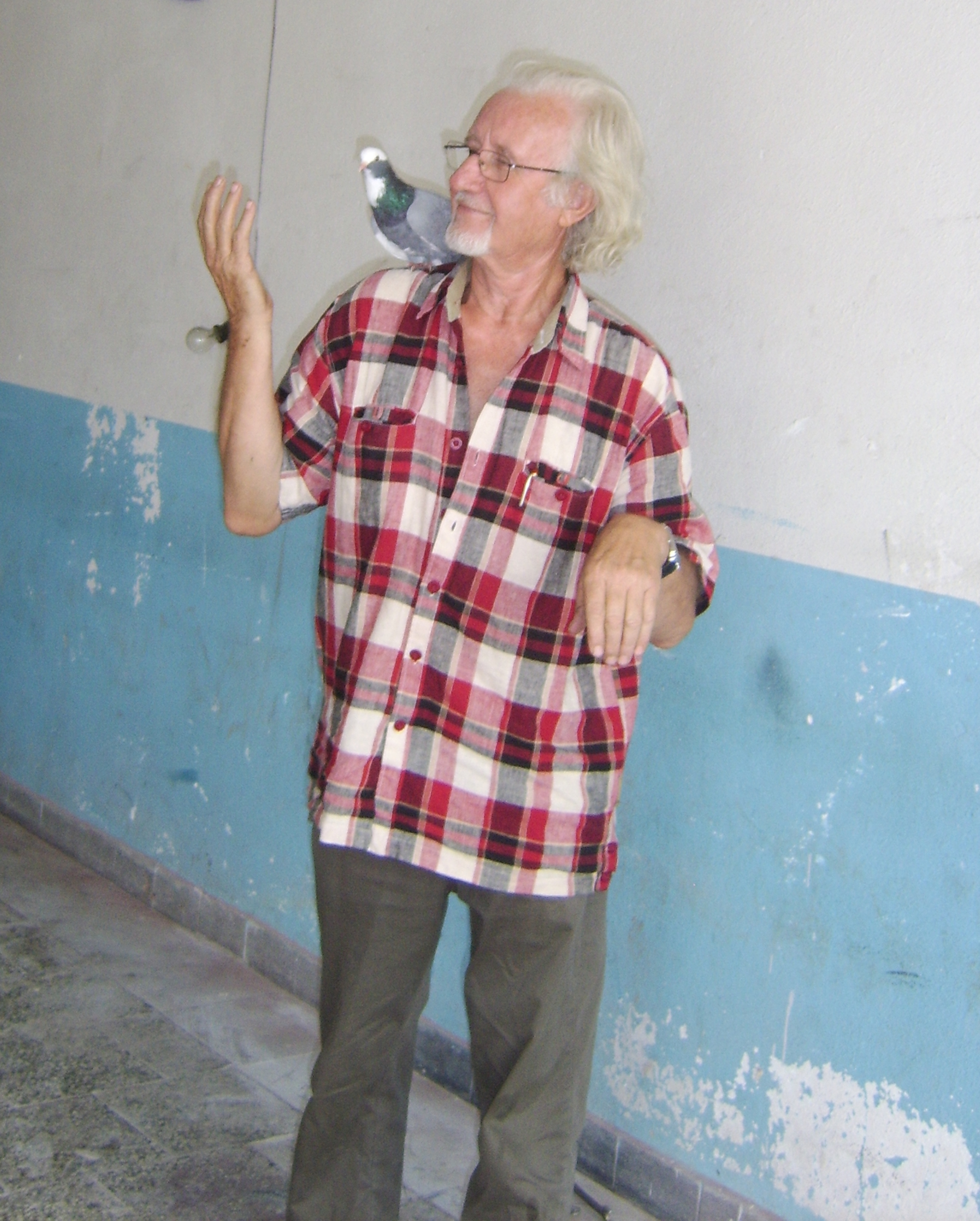 Pëllumbat,foto